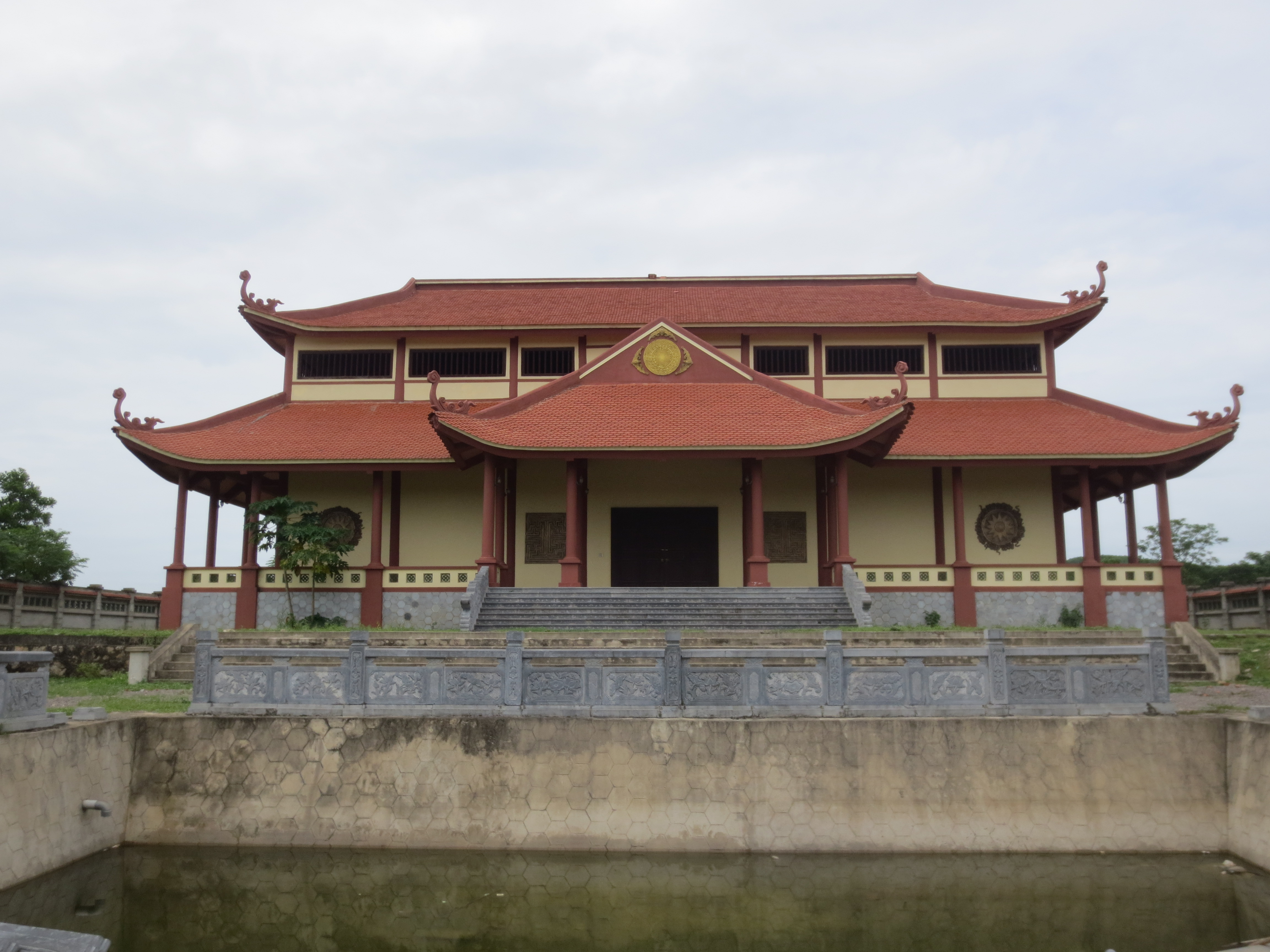 Bảo tàng Chiến khu Quỳnh Lưu ở Ninh Bình